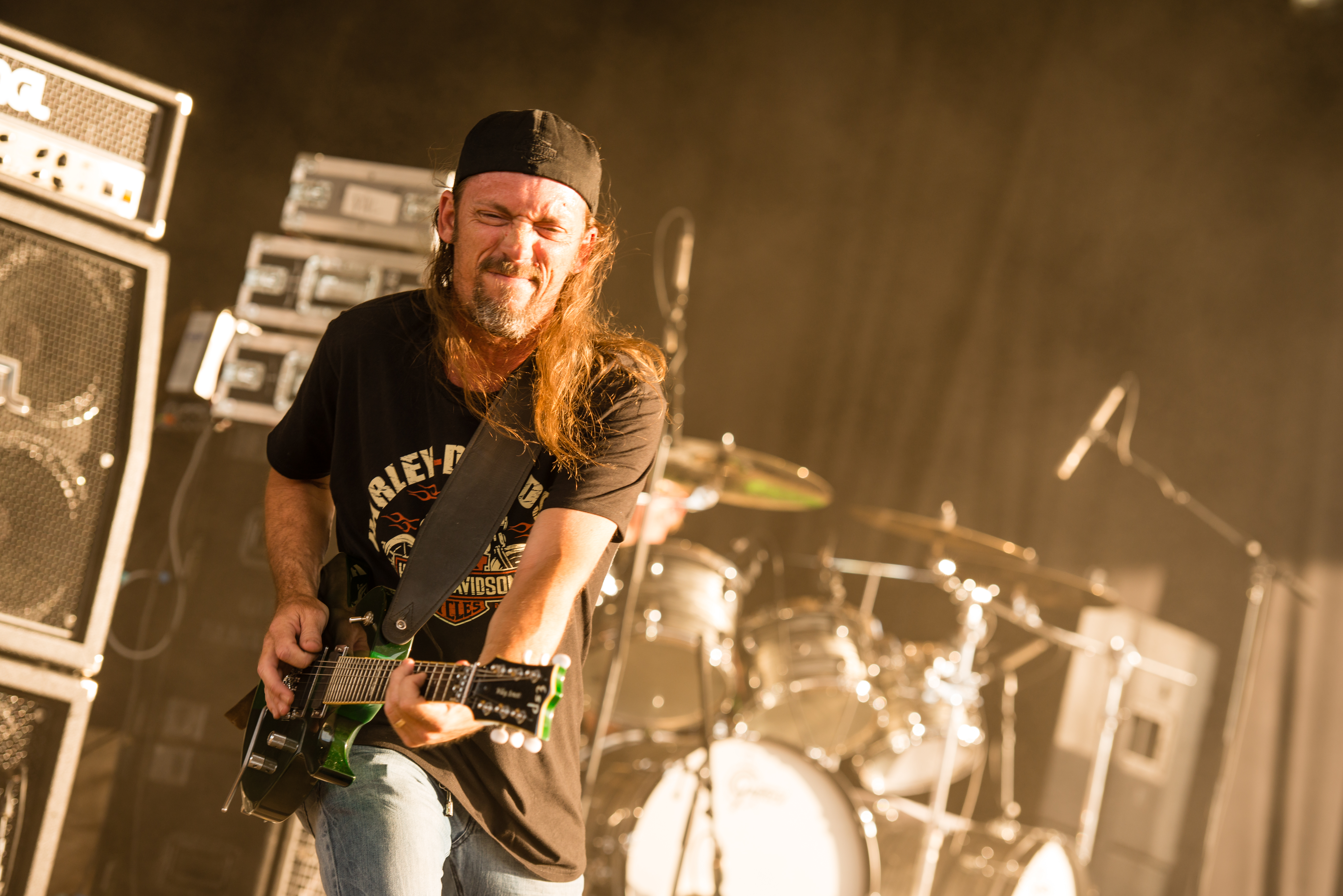 'Rock Hard Festival 2014 - Gelsenkirchen': 'Sacred Reich'